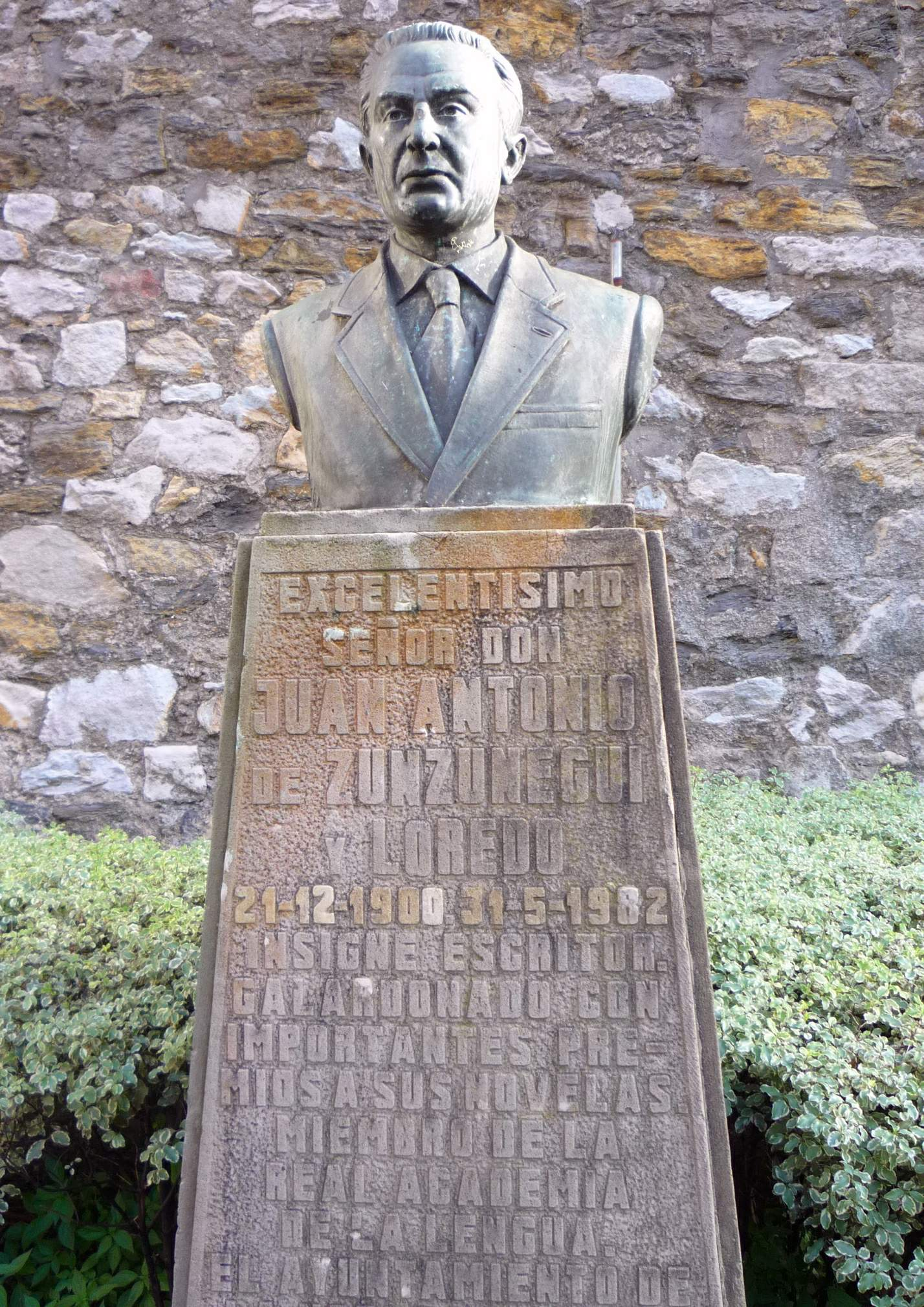 Monumento al escritor Juan Antonio de Zunzunegui y Loredo , (Portugalete, Vizcaya)